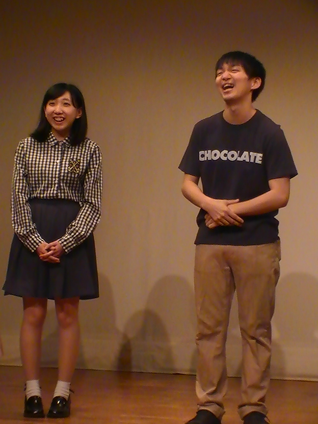 パーパー (2017年6月18日)